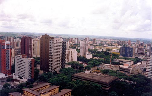 Maringá, Brasil. Foto de autoria de Pedro Aguiar, tirada em fevereiro de 2003 do alto da Catedral de Nossa Senhora da Glória.